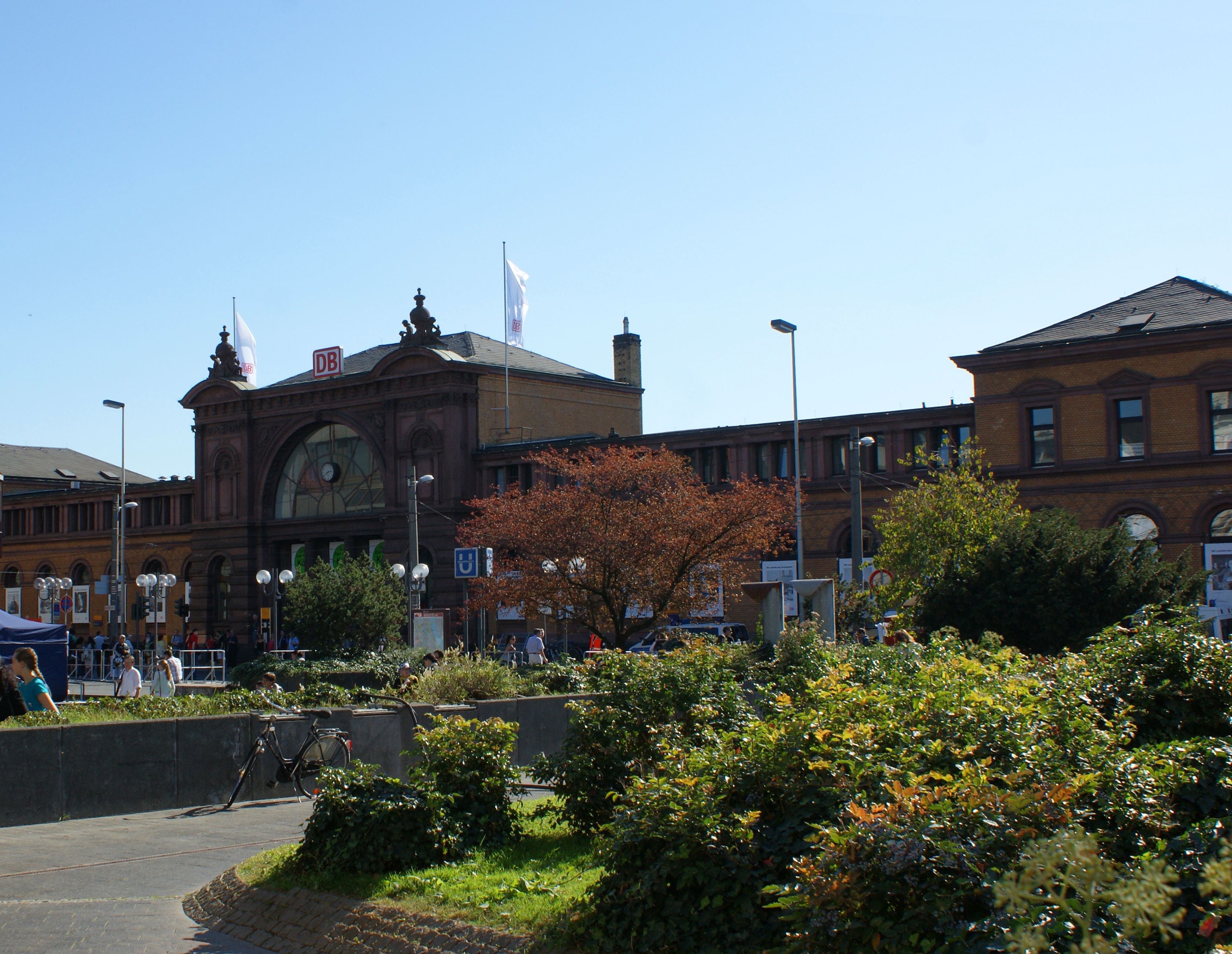 Северный Рейн - Вестфалия, Бонн - Главный вокзал